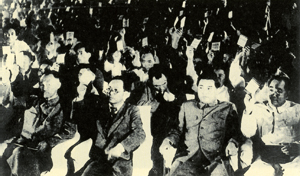 Kim Chak, Park Hon yong, Kim Il-sung, Choi Yonggun, in Pyungyang, 1948.09.02